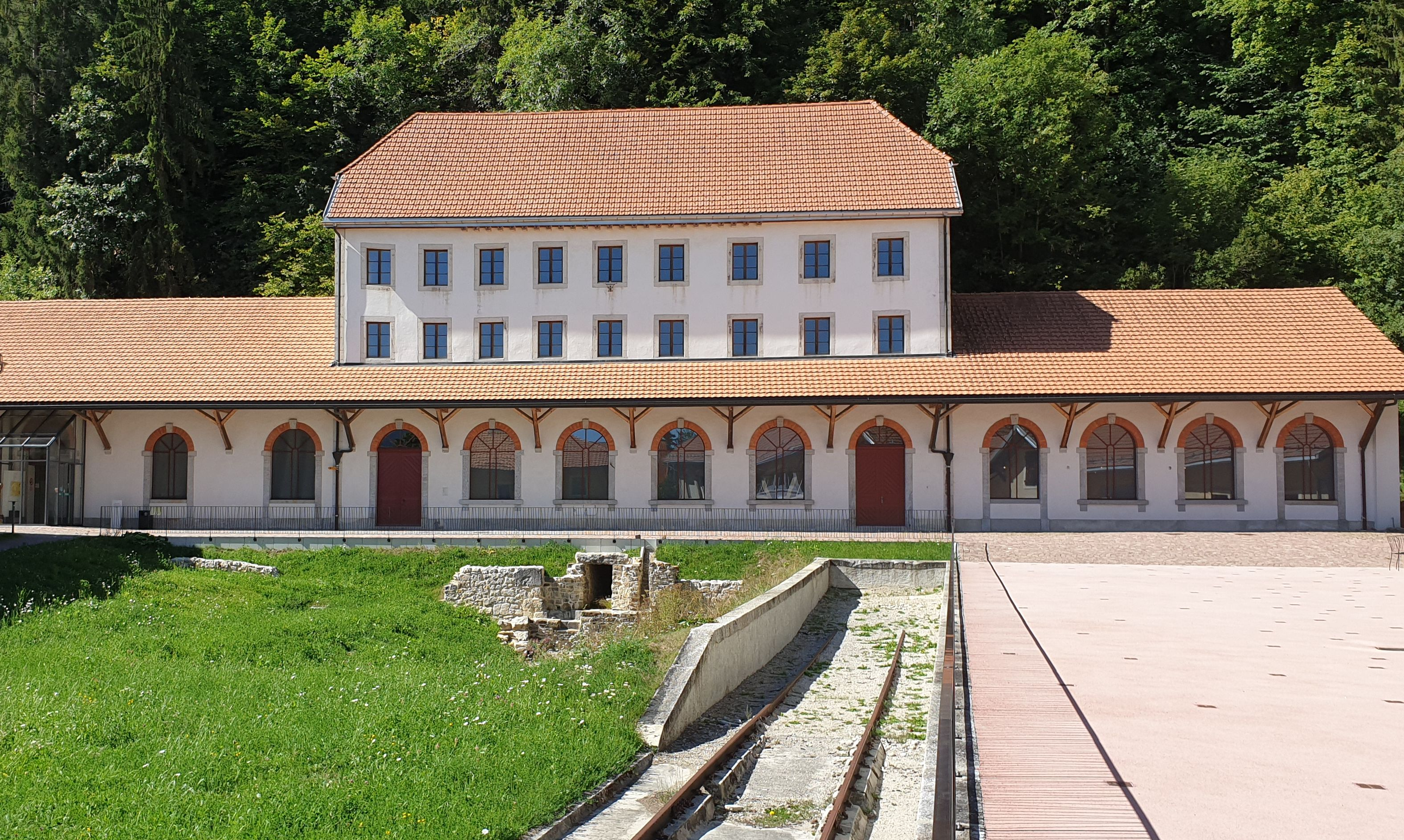 Höhlenmühlen von Le Locle: Eingangsgebäude; in der Mitte Ruinen eines ehemaligen Sägewerkes, das mittels einer Welle von einem Wasserrad aus den Höhlen heraus angetieben wurde, daneben Gleisanschluss für späteres Schlachthaus.